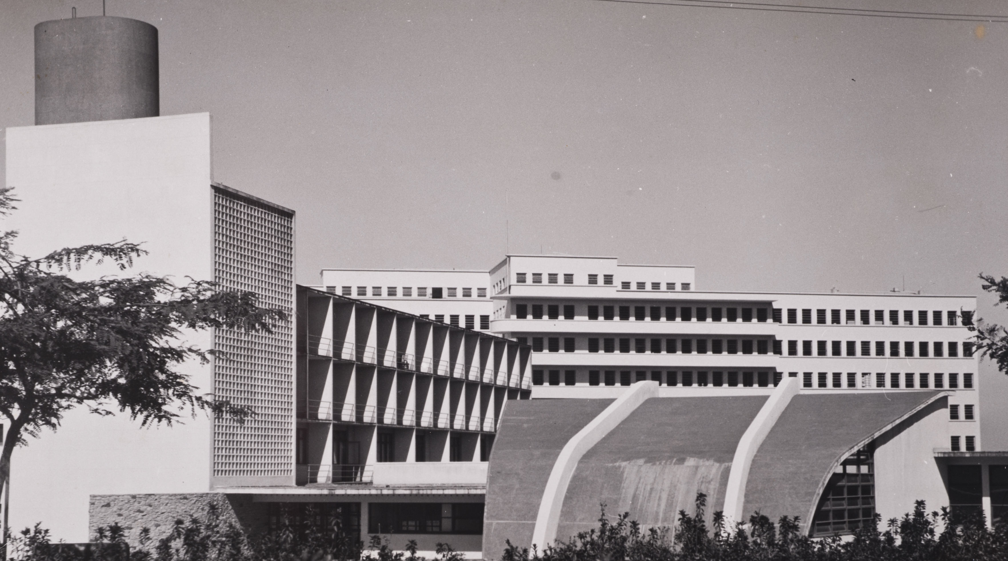 Obra que integra o acervo do Museu Paulista da USP. Coleção Werner Haberkorn - CHW